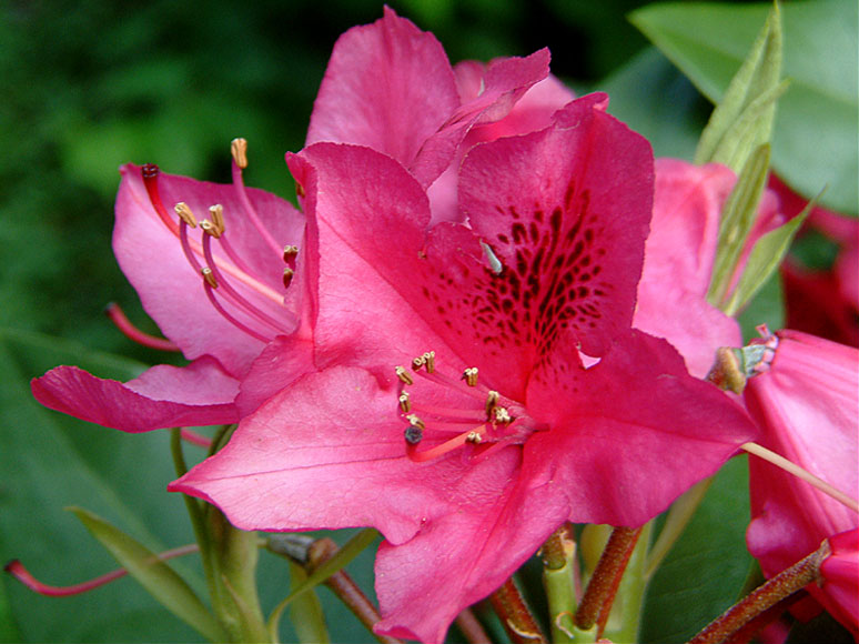 Makro-Aufnahme einer roten Rhododendron-Blüte